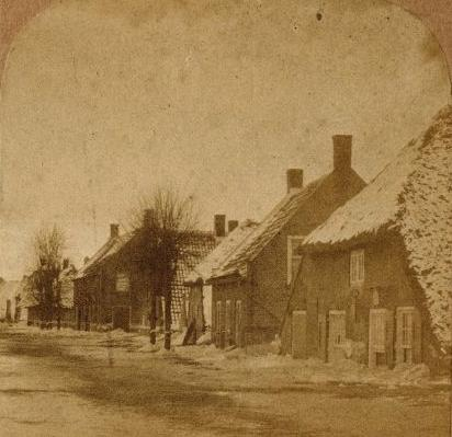 Dit is de oudste foto van Ammerzoden, gemaakt tijdens de watersnoodramp van 1861.